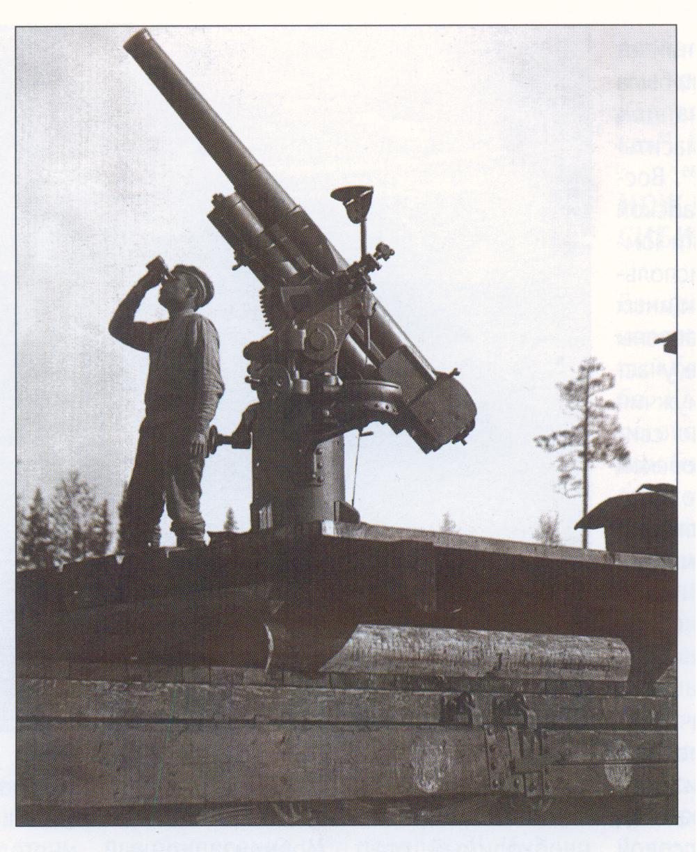 Белое зенитное орудие 76-мм зенитная пушка образца 1914/15 годов на колчаковском (вероятно) (броне? не указано)поезде. 1919